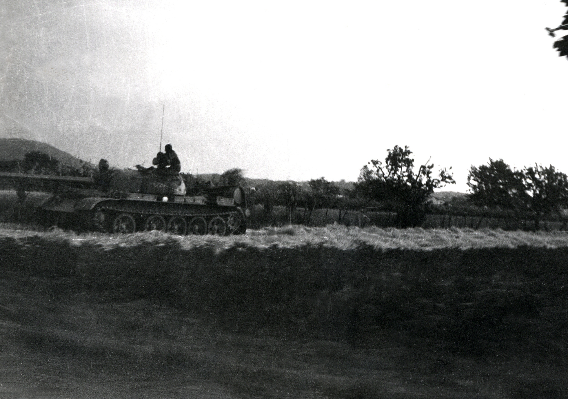 Tank JLA na Vrtojbenskem polju pri mejnem prehodu Vrtojba med slovensko osamosvojitveno vojno.